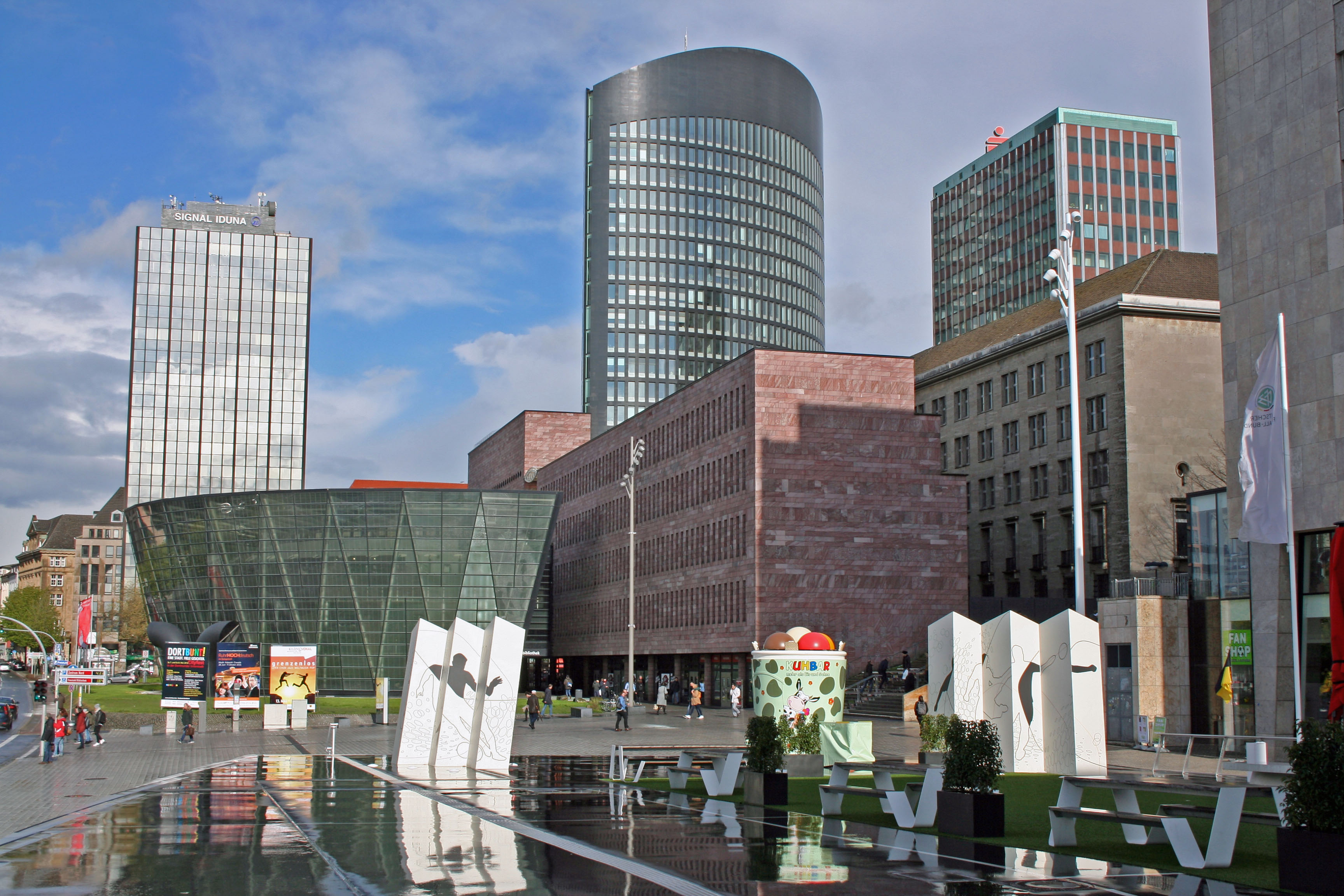 Platz der Deutschen Einheit, Dortmund, Germany